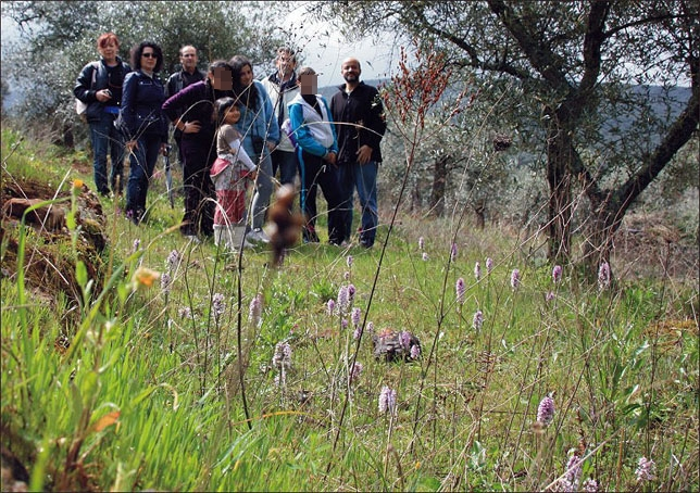 Asistentes al Testing fotografiados entre las orquideas de la Sierra de Alor